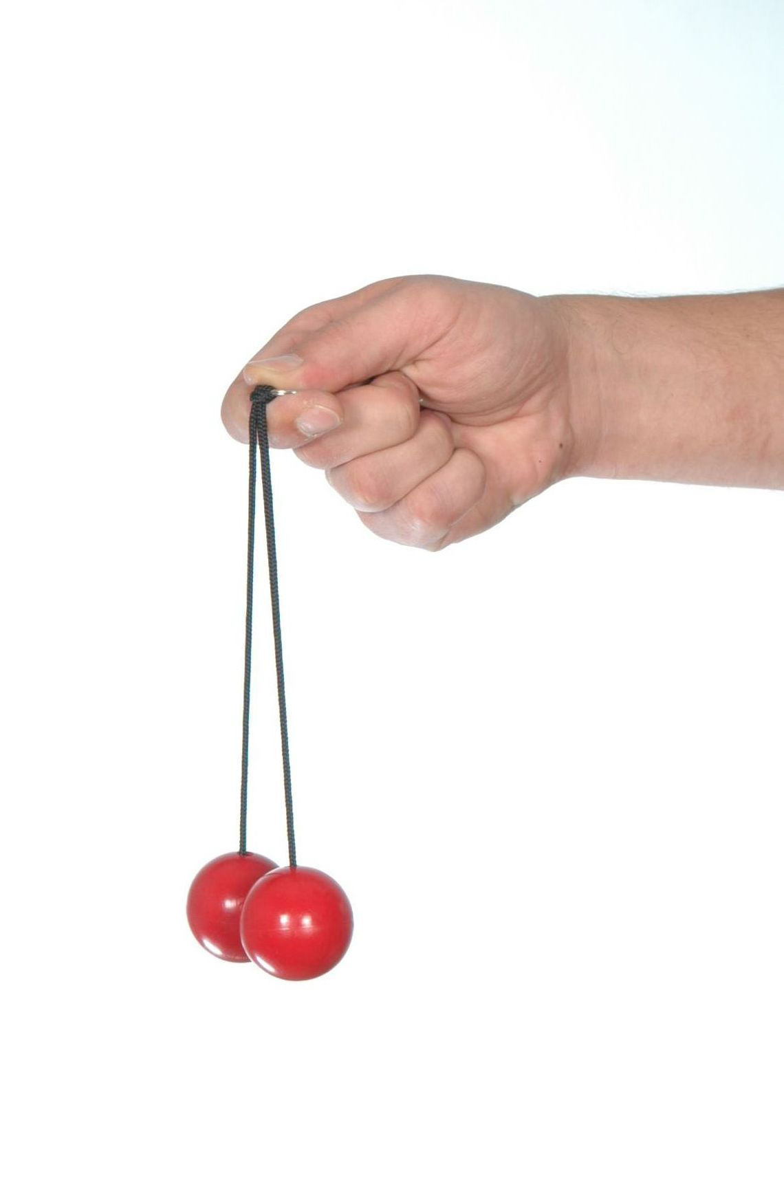 Způsob držení kliklaku mezi konečky prstů